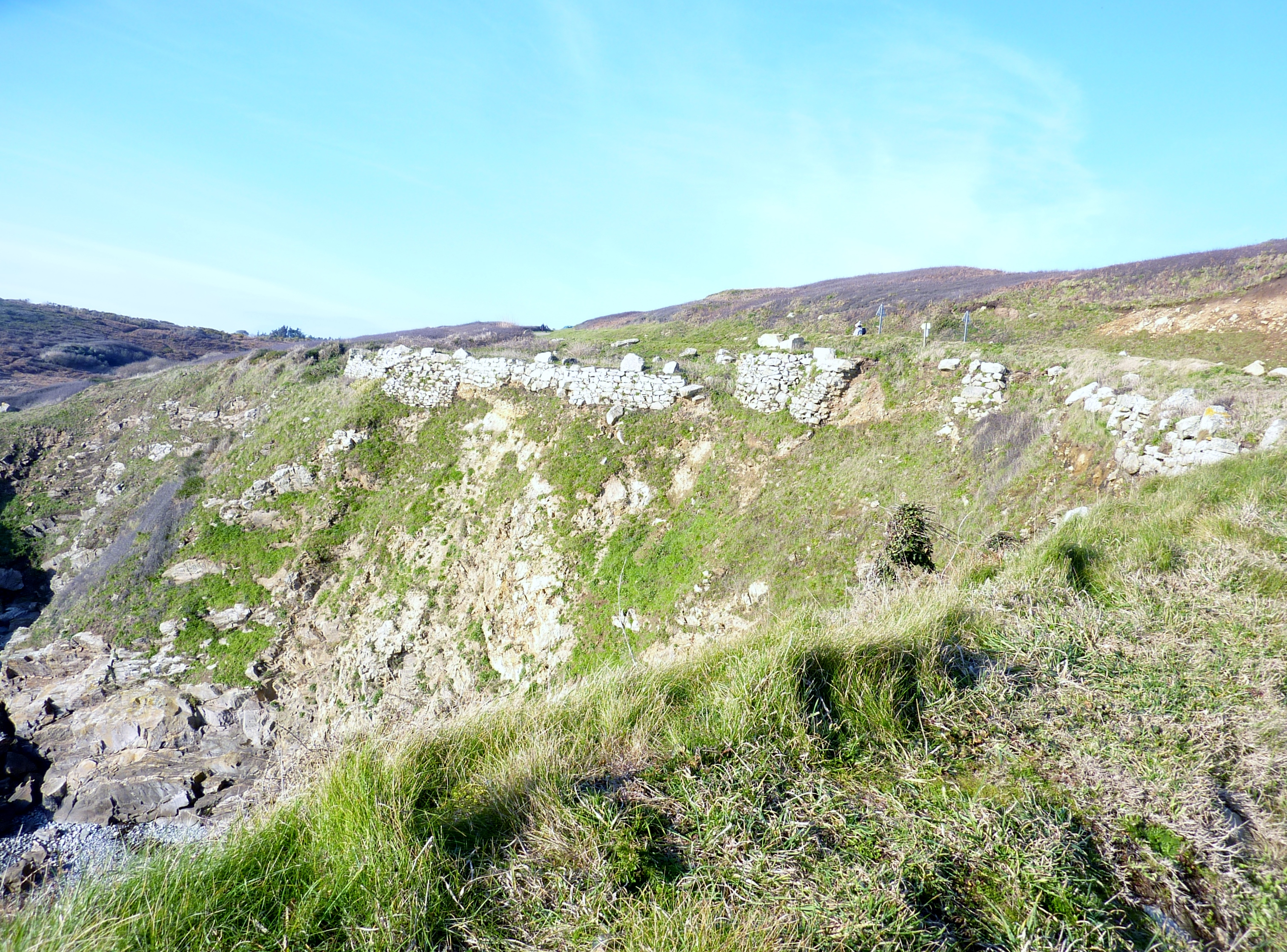 Plogoff : mur de soutènement en partie effondré (soubassement des vir a vod servant à la remontée du goémon) juste à l'ouest de Pors Loubous